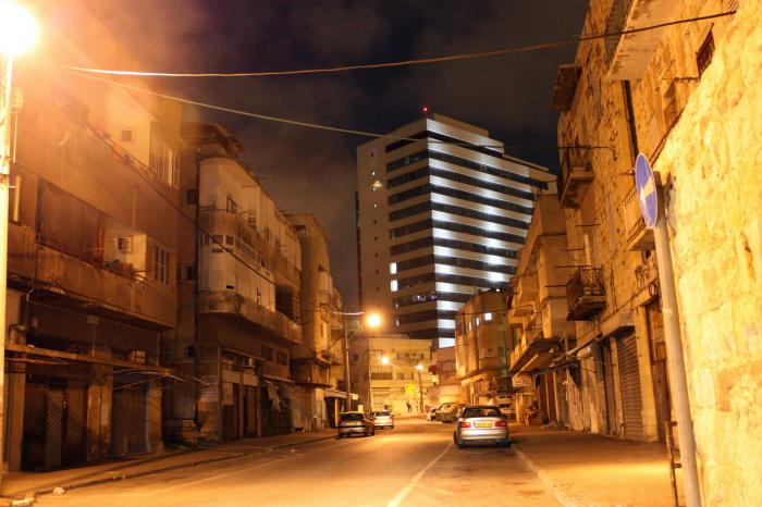 צילום לילי של רחוב חיפאי